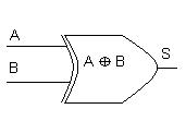 Simbologia do OU-EXCLUSIVO